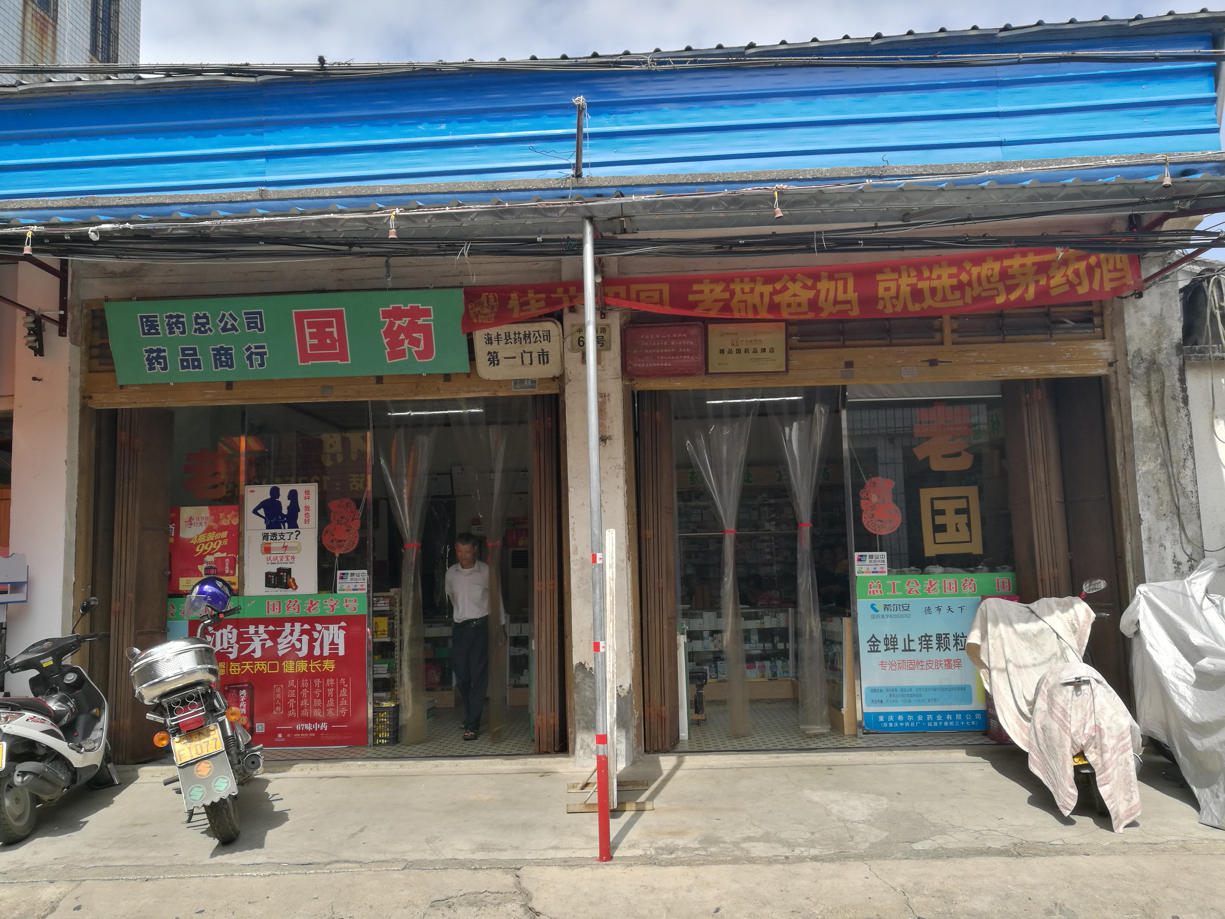 中国广东省汕尾市海丰县城幼石街